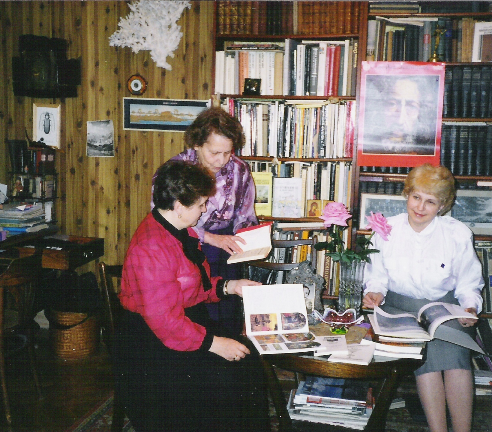 У Л. М. Предтеченской в кабинете. Слева направо: учитель музыки и МХК школы № 1250 г. Москвы, заслуженный учитель России Юлия Викторовна Янике, ст. научный сотрудник Лаборатории МХК ИОО РФ Лия Михайловна Предтеченская, ст. научный сотрудник Лаборатории МХК ИОО РФ Людмила Валентиновна Пешикова.1996 год